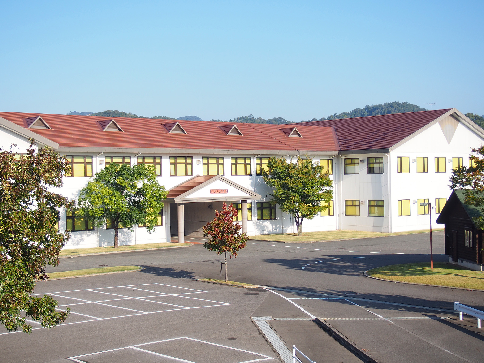 ローツェ本社 (2015年撮影)